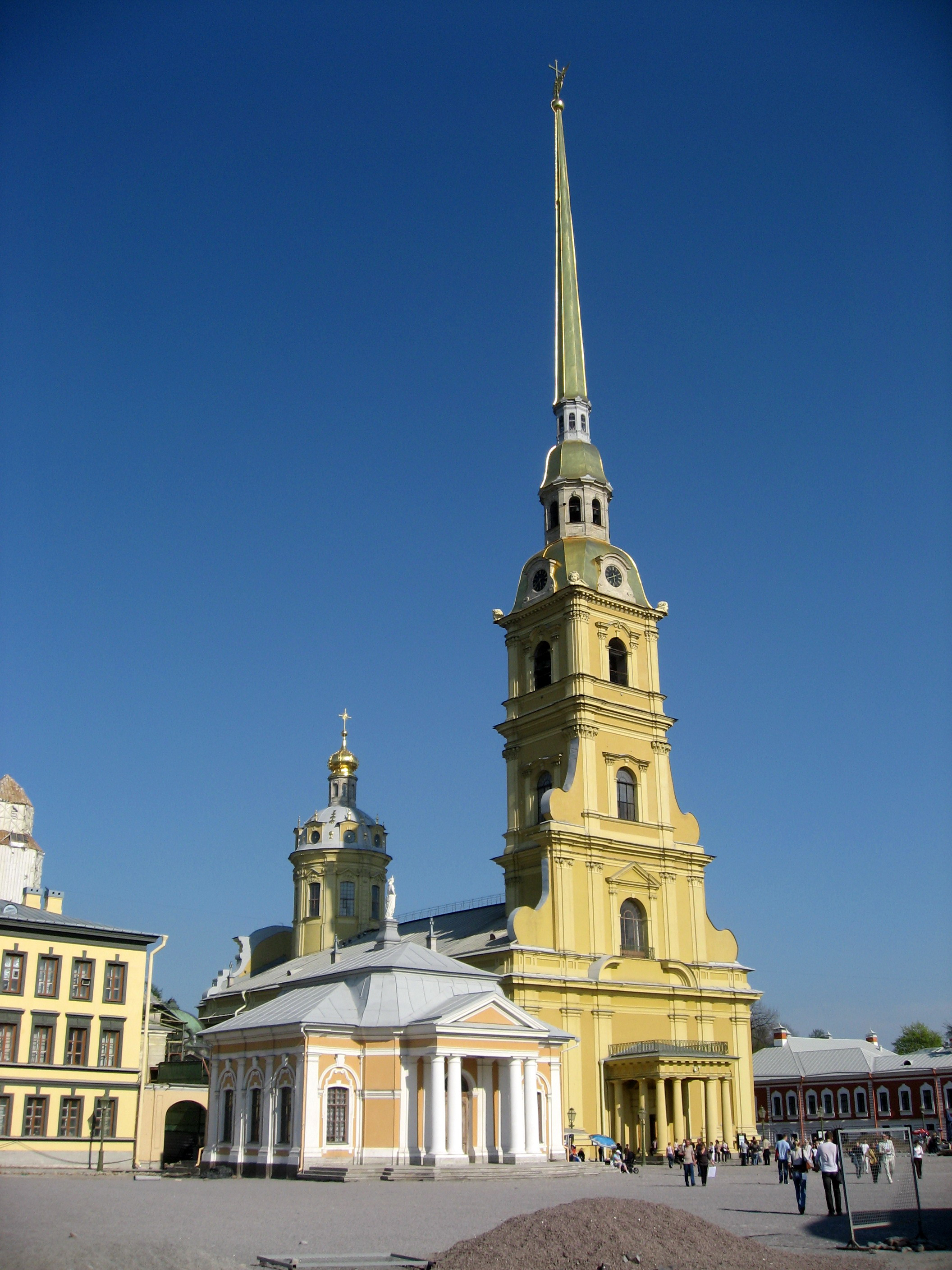 Saint Petersburg, Chrám svatého Petra a Pavla